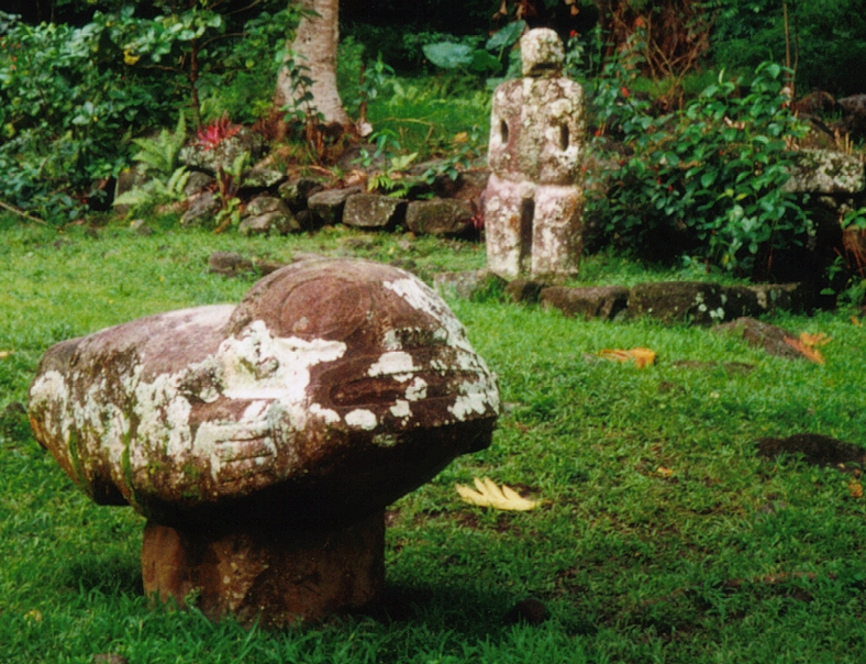 Statue Makiʻi Taua Pepe am Marae Takii im Puamau-Tal, Hiva Oa, Marquesas, Französisch-Polynesien. Hochgeladen 2009. S. dazu dieselbe Statue, 1897.